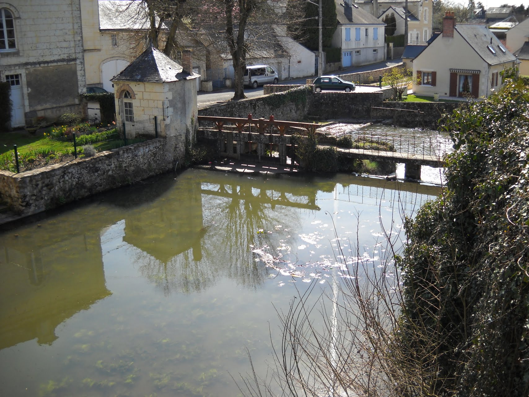 Le Couesnon